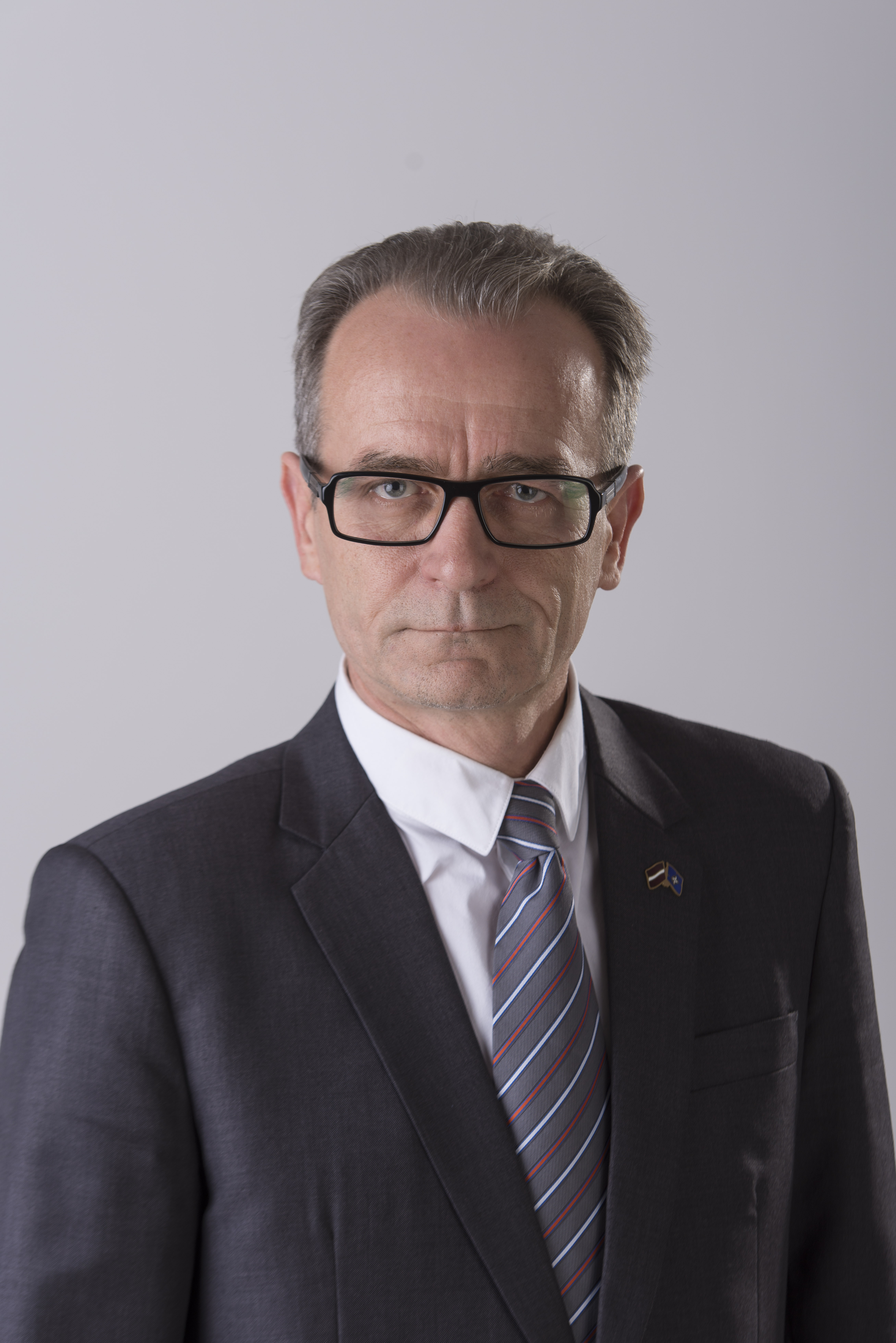 2014.gada 9.decembris. 12.Saeimas deputāts Dzintars Rasnačs. Foto: Reinis Inkēns, Saeimas Kanceleja Izmantošanas noteikumi: saeima.lv/lv/autortiesibas